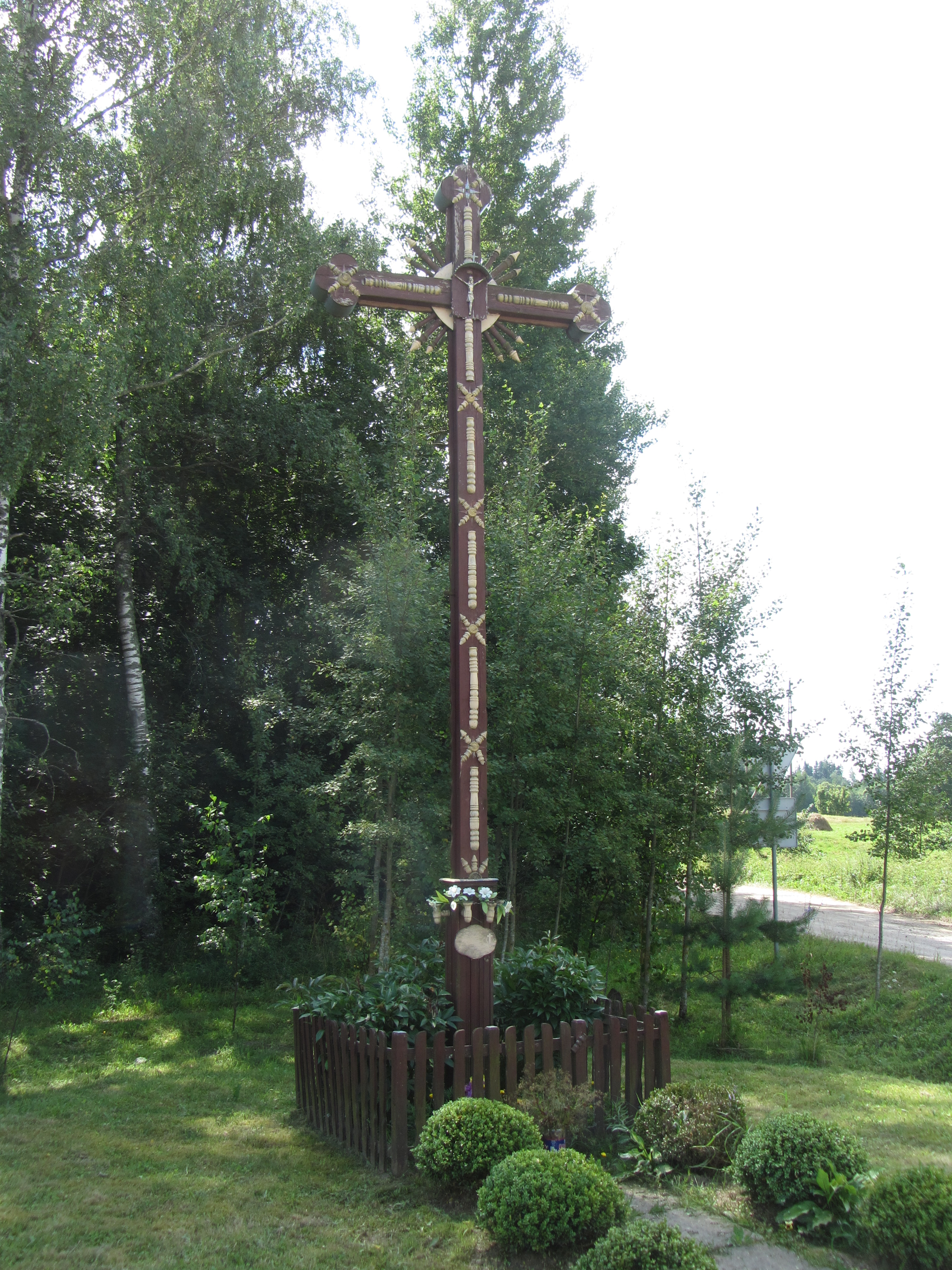 Milkuškos 18108, Lithuania